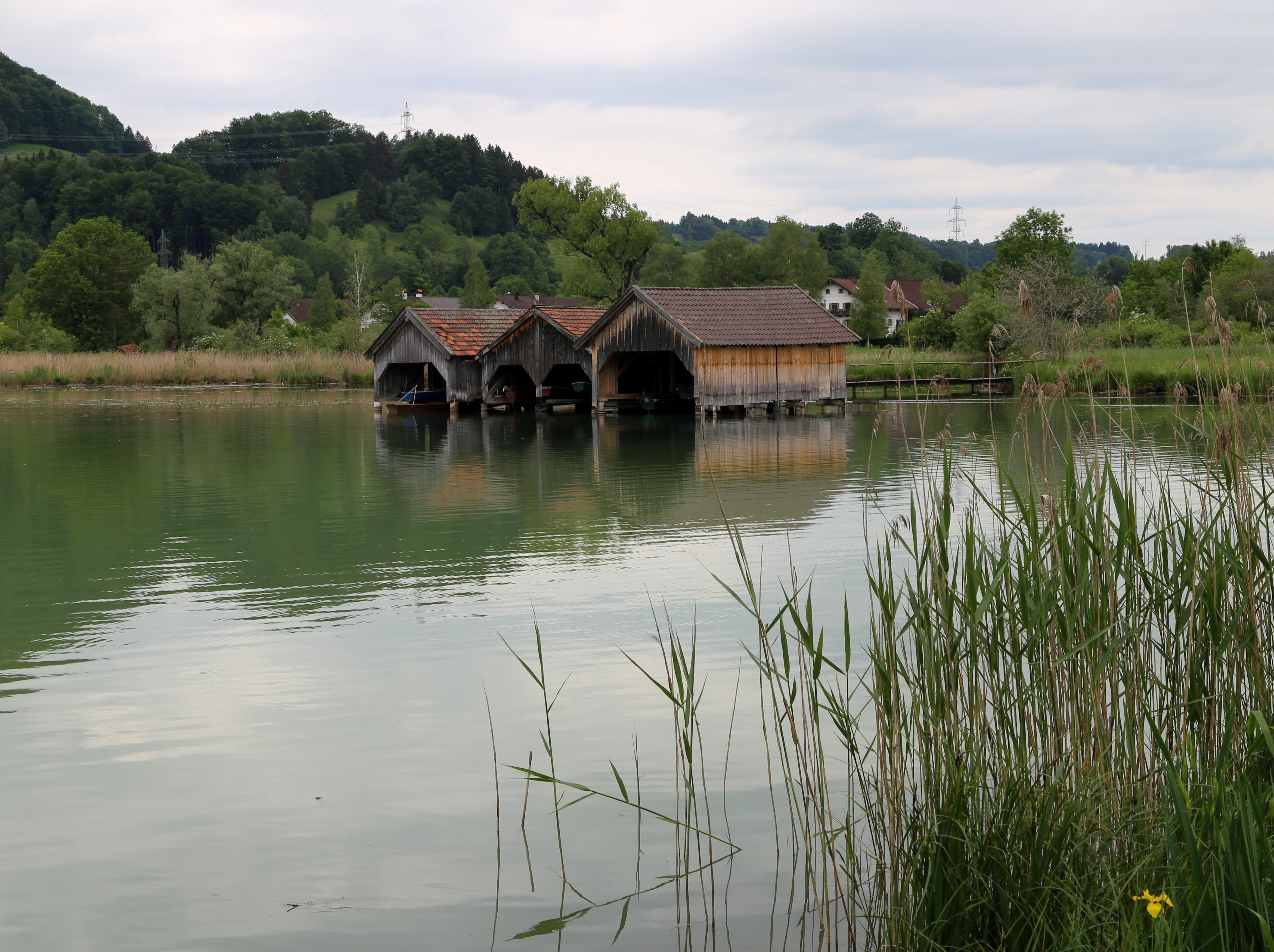 Kochelsee bei Schlehdorf